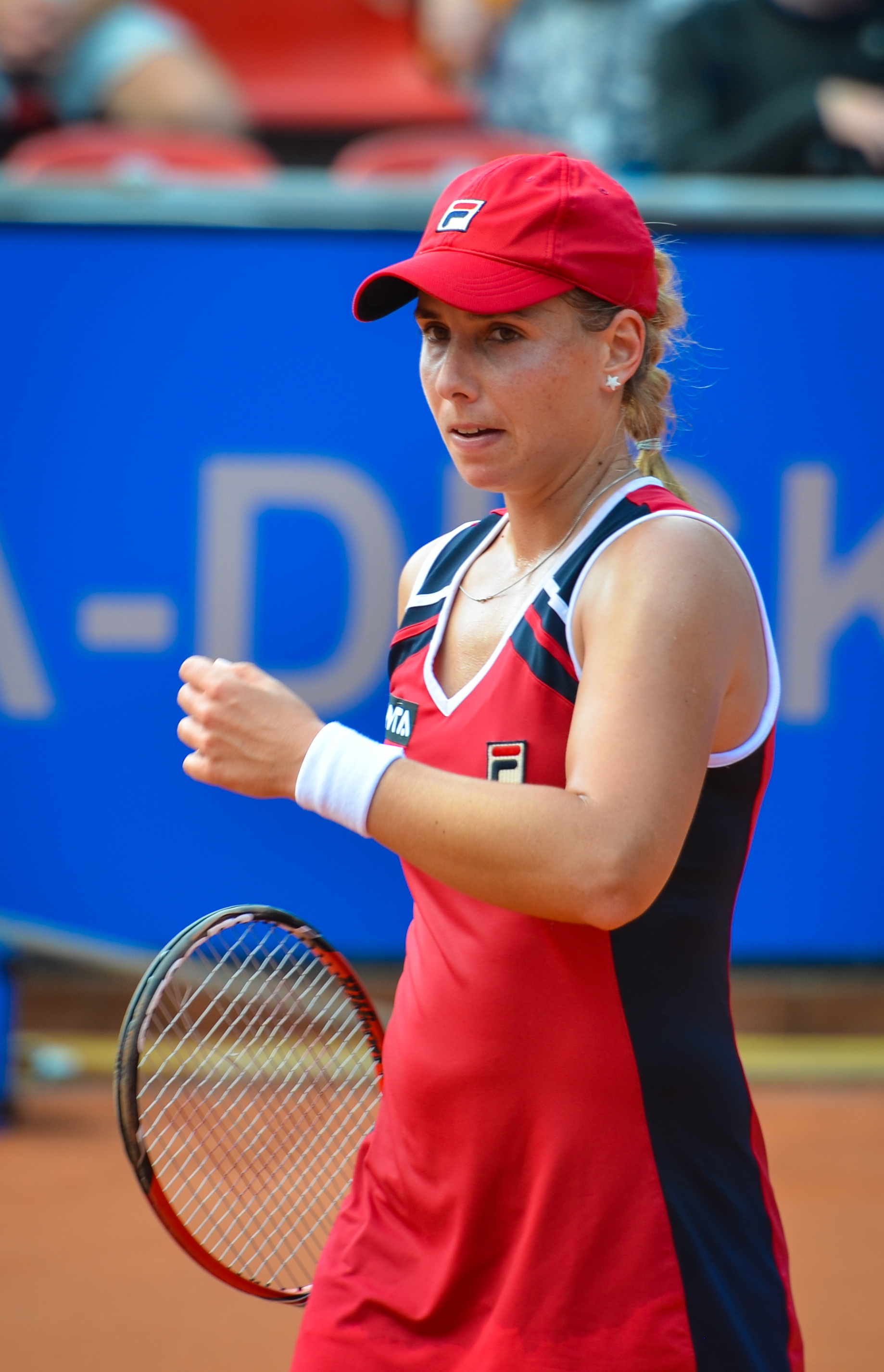 Marina Erakovic during her 1st round match against Angelique Kerber at the 2014 Nürnberger Versicherungscup on May 20, 2014